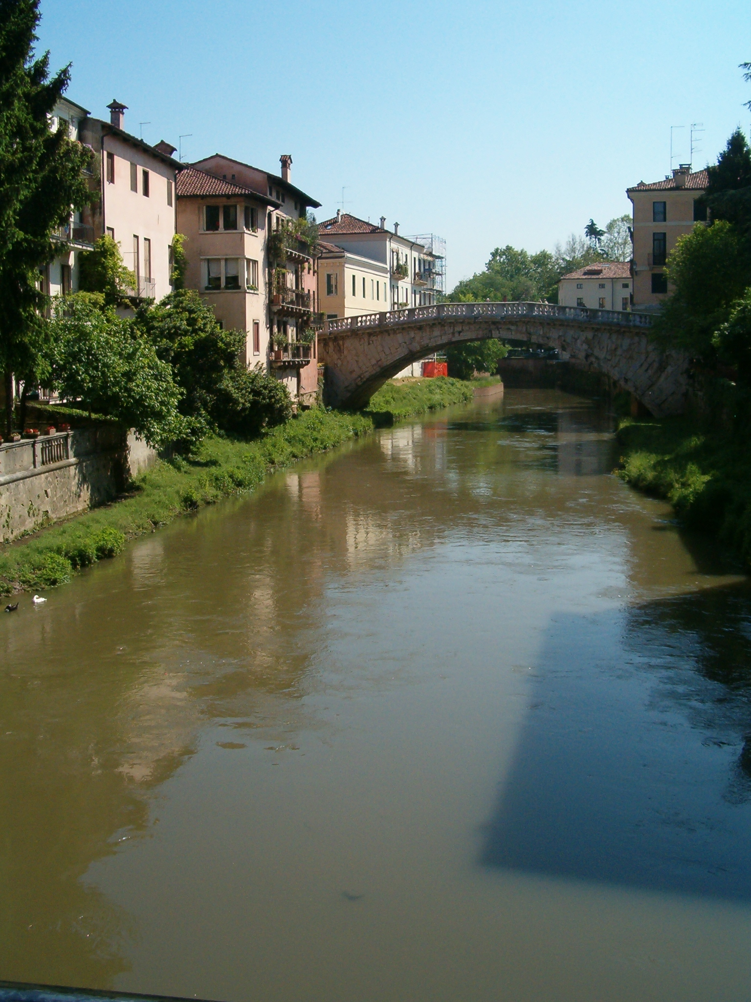 Vicenza, Vista di ponte S. Michele sul fiume Retrone, da ponte S. Paolo.